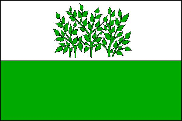 Vlajka obce Zakřany